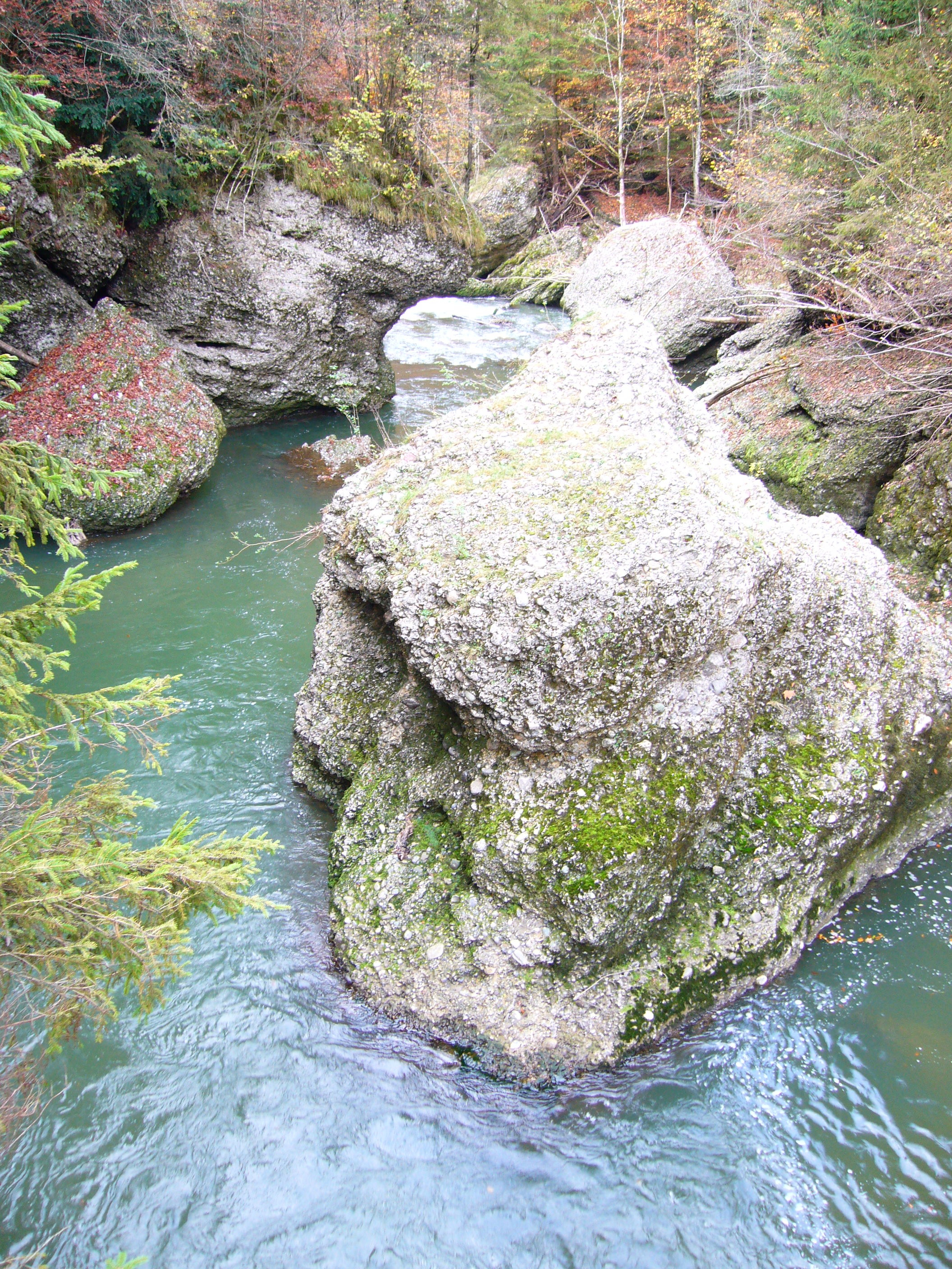 Sihl beim Sihlsprung. Blick flussabwärts.